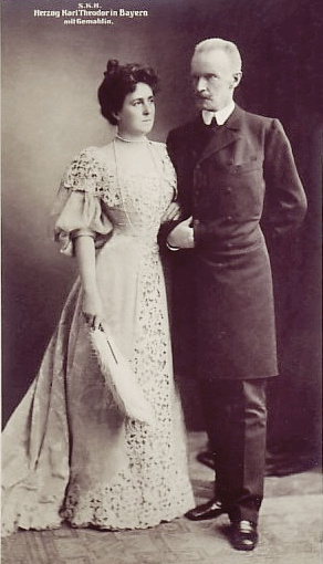 Herzog Carl-Theodor in Bayern und Gattin Marie Jose von Portugal